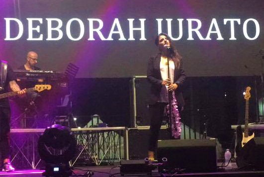 Deborah Iurato durante una tappa del "Sono ancora io" tour, il 18-08-2016 in occasione dell'evento "I Colori dell'Olio" tenutosi a Presicce (LE).